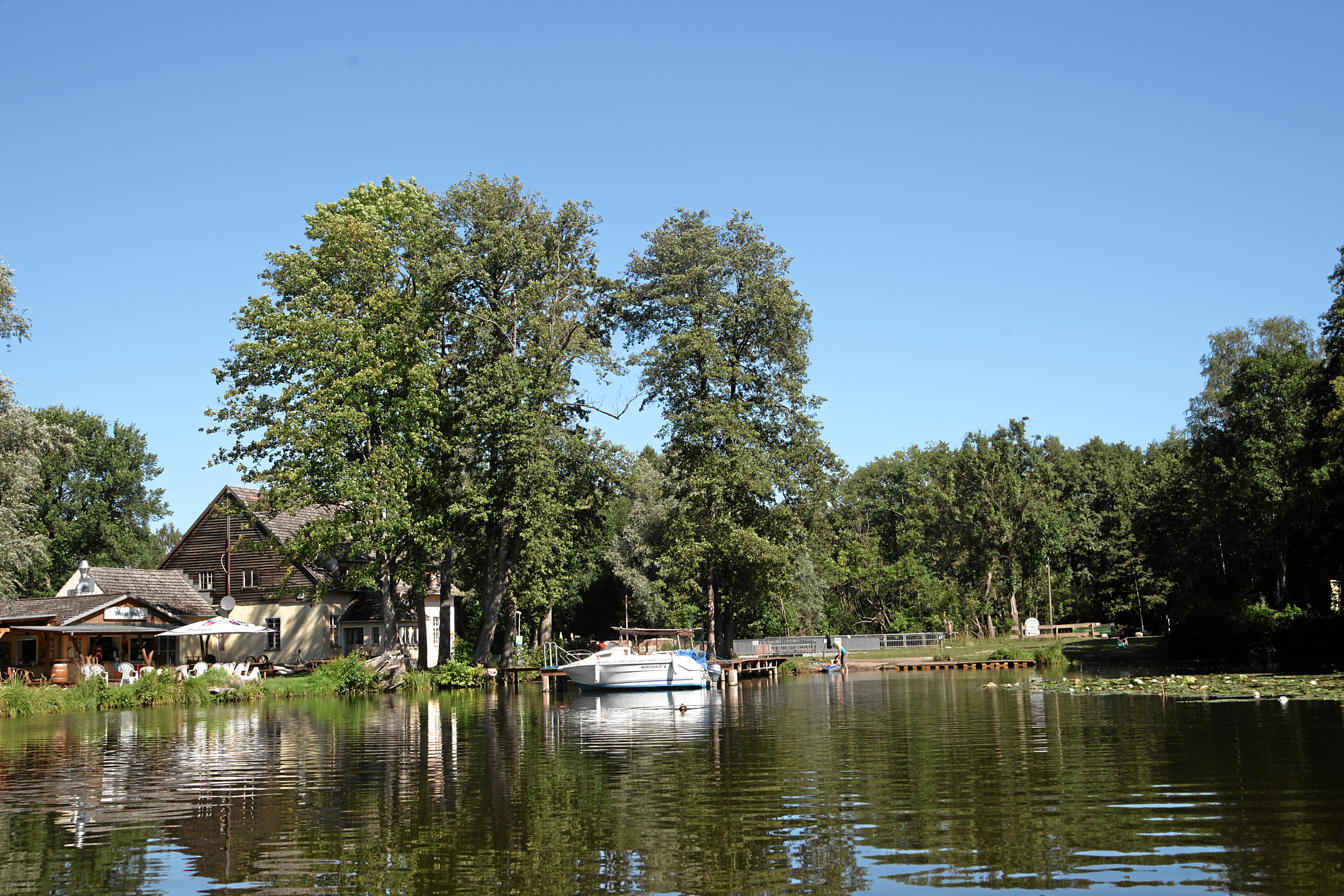 Oberbek, Umtragestelle an der Fleether Mühle